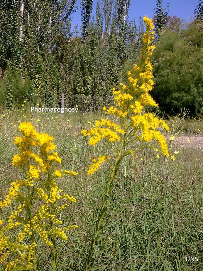 Imagen de la especie Solidago chilensis en floración, durante el mes de marzo.